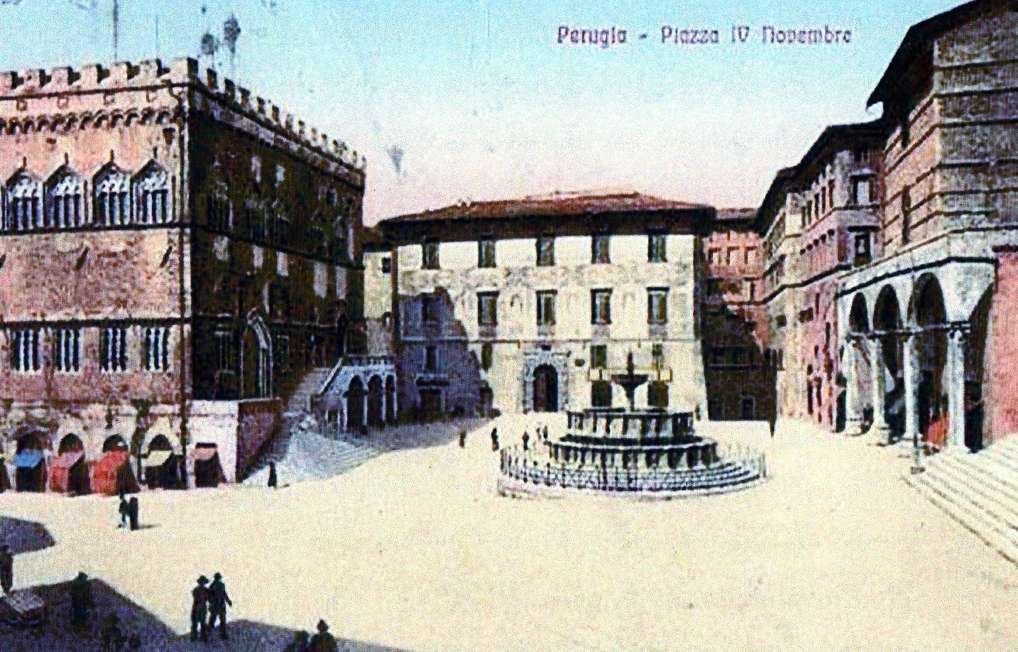 panoramica di piazza IV Novembre, a Perugia